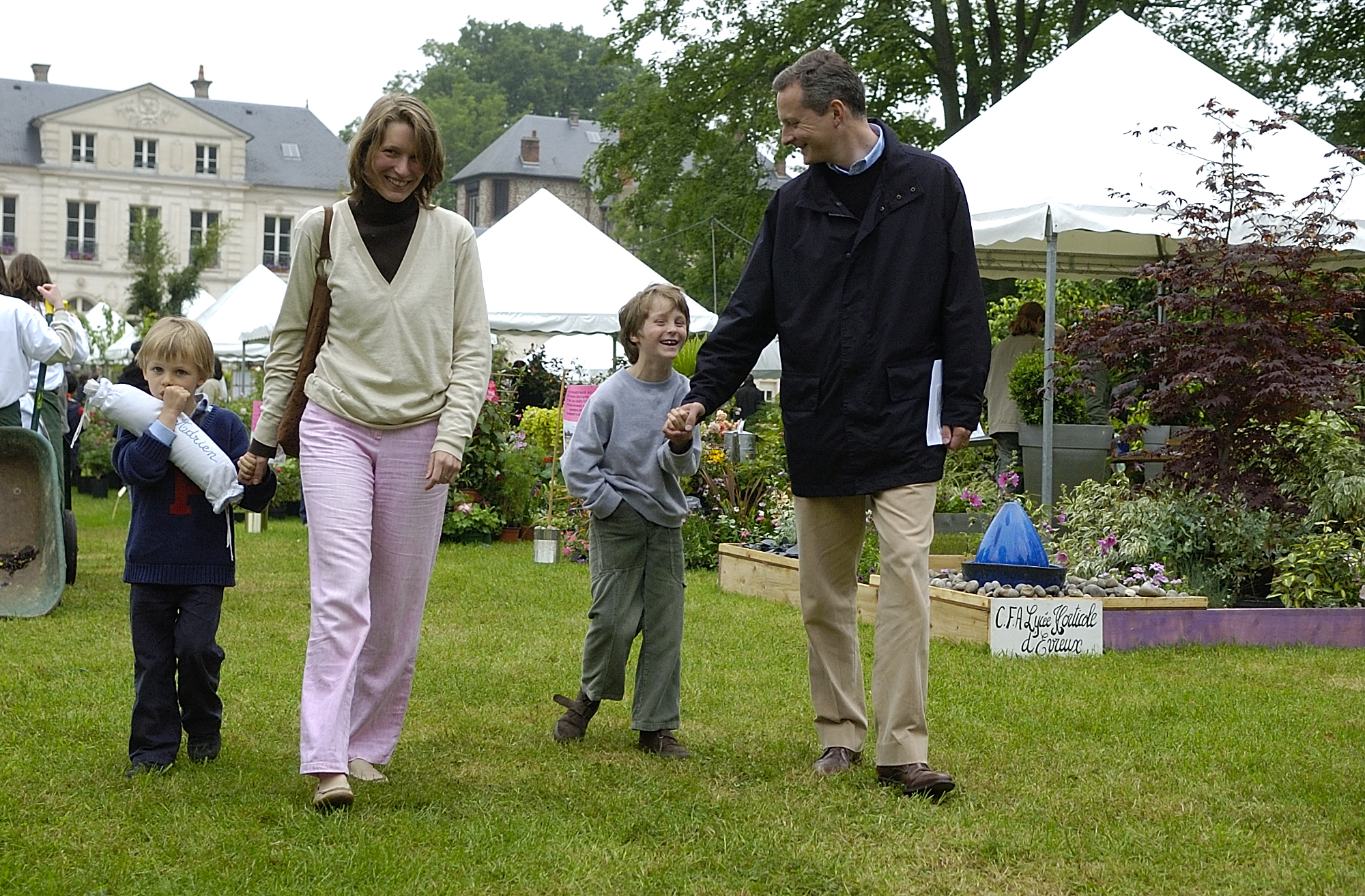 Bruno Le Maire Fête des fleurs, Trangis, Evreux 26/05/2007